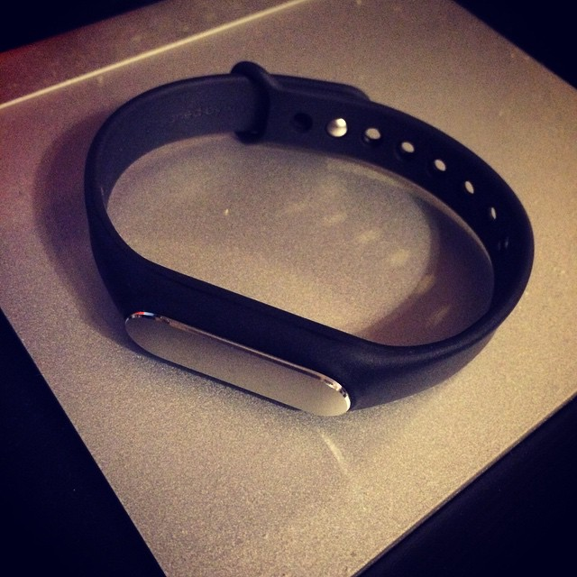 Le bracelet connecté de Xiaomi appelé Mi Band.